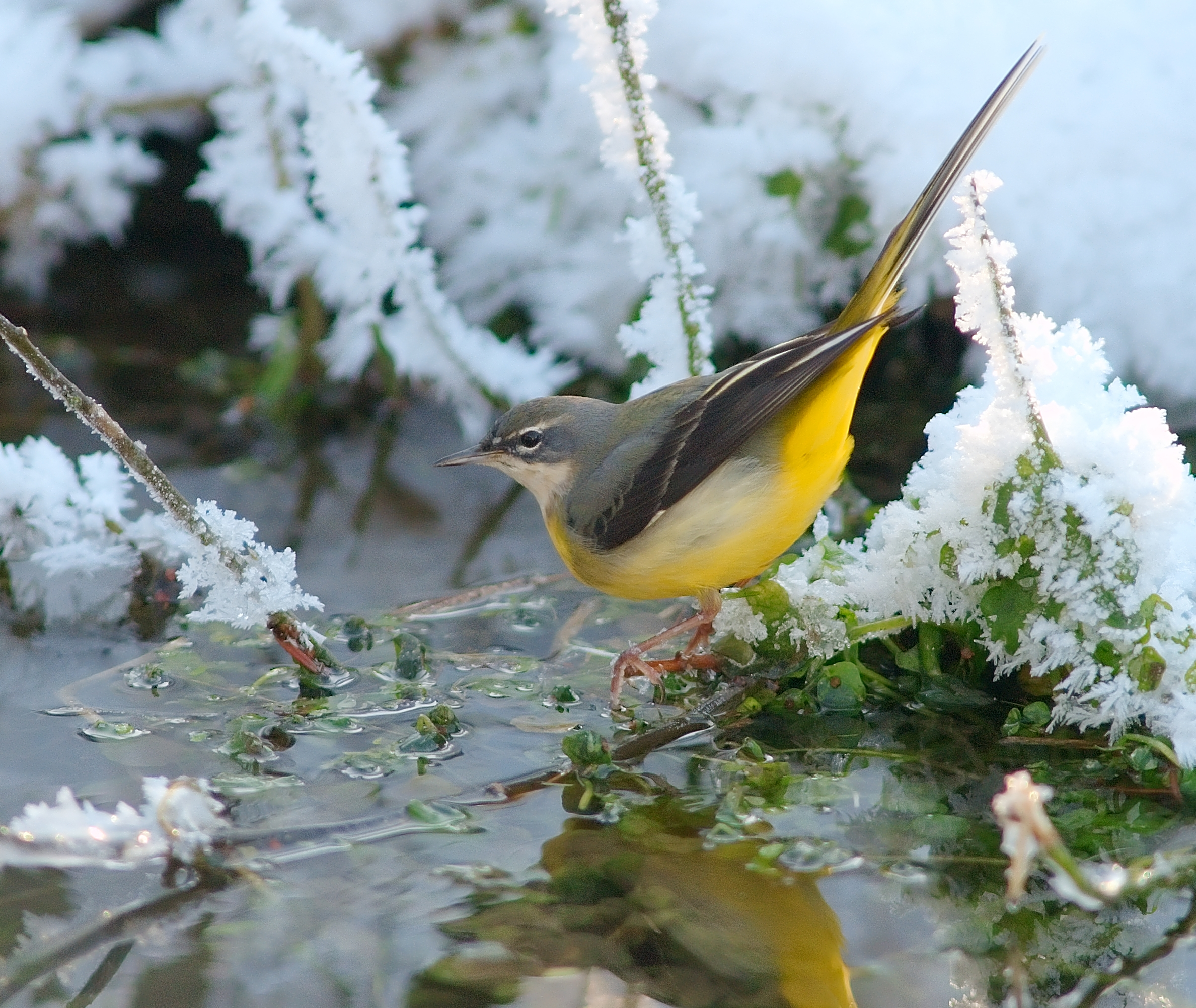 Bergeronnette des ruisseaux Motacilla cinerea Grey Wagtail